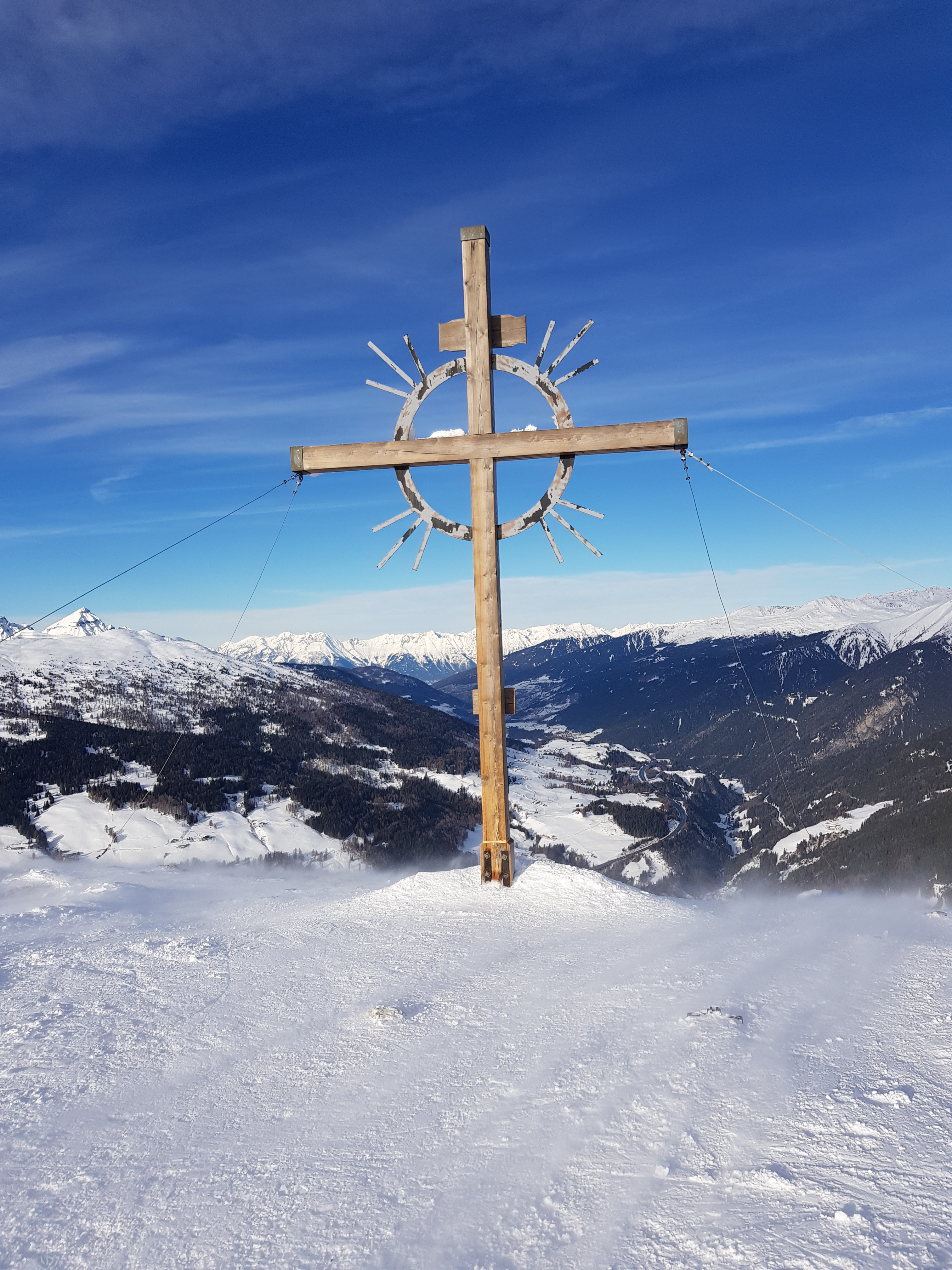 Gipfelkreuz Sattelberg bei Südwind mit ≈15 m/s. Blick nach Norden